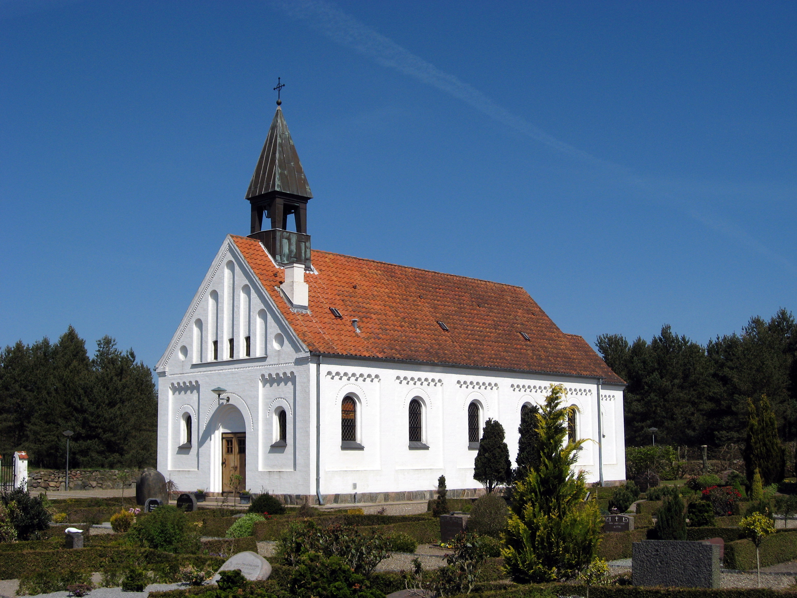 Melholt Kirke, Brønderslev Kommune